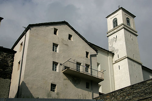 Simplon-Dorf: Kirche